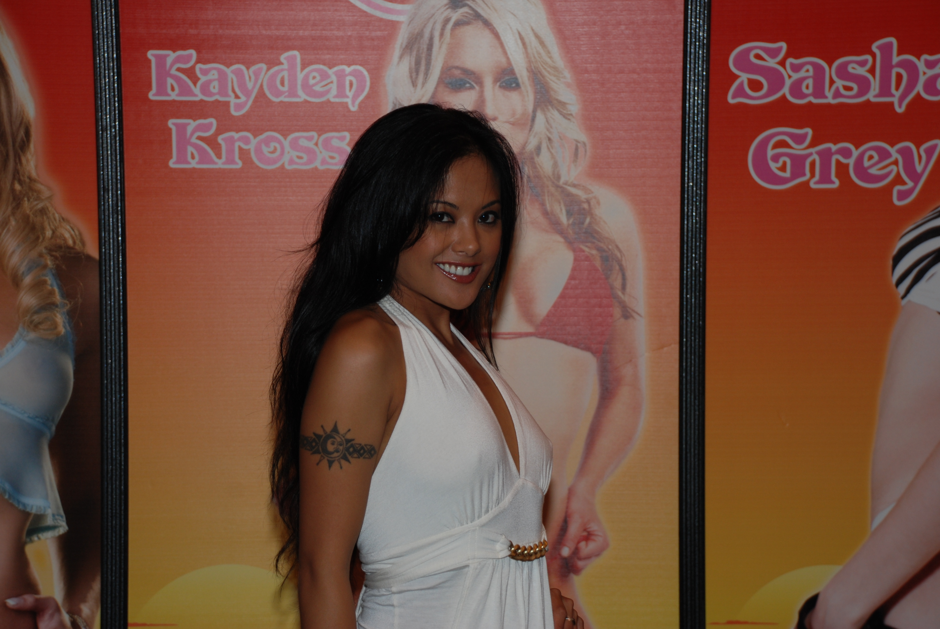 Miami Exxxotica 5-10-09 Nikon 300